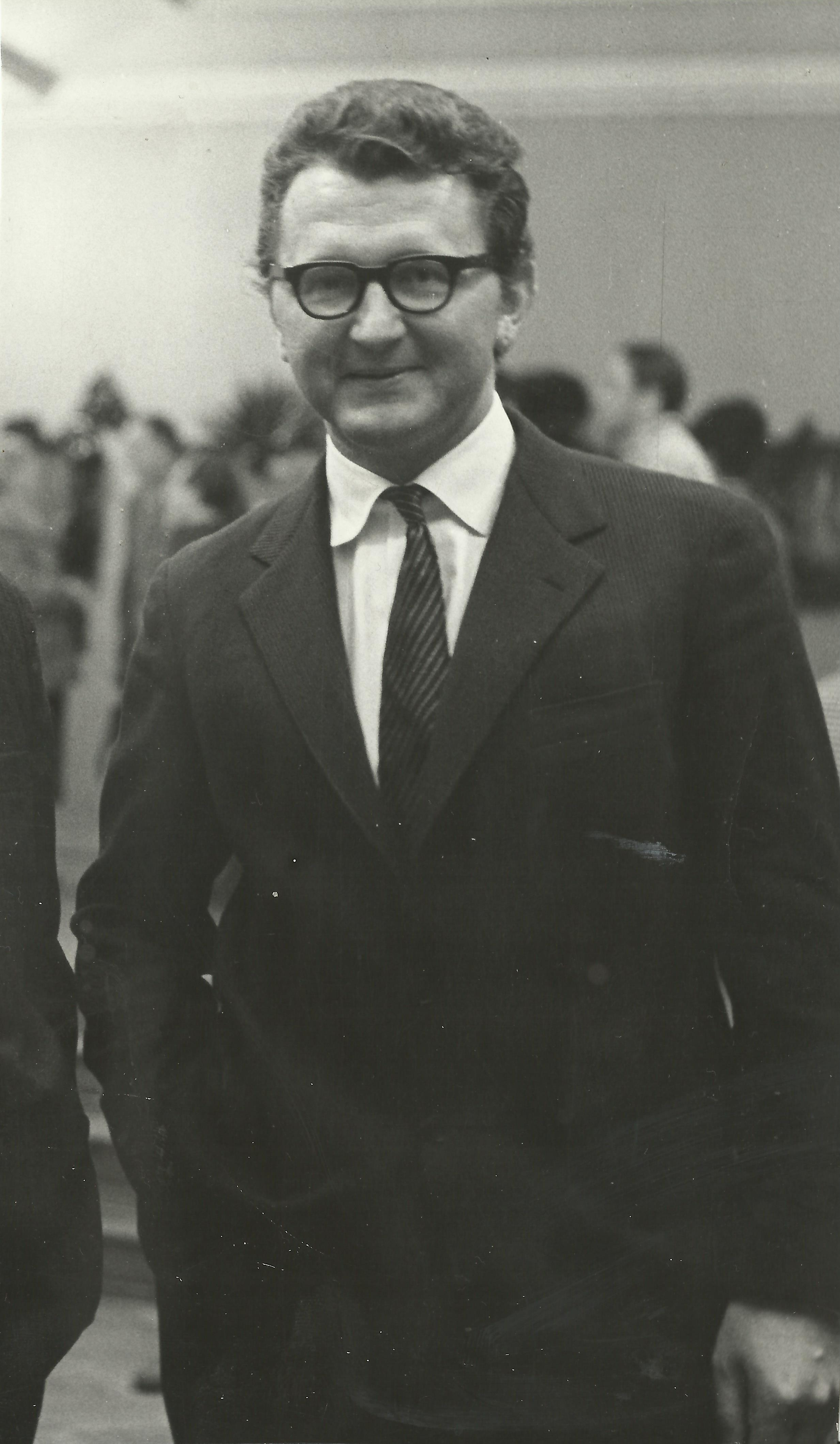 Jaroslav Vožniak (1964)